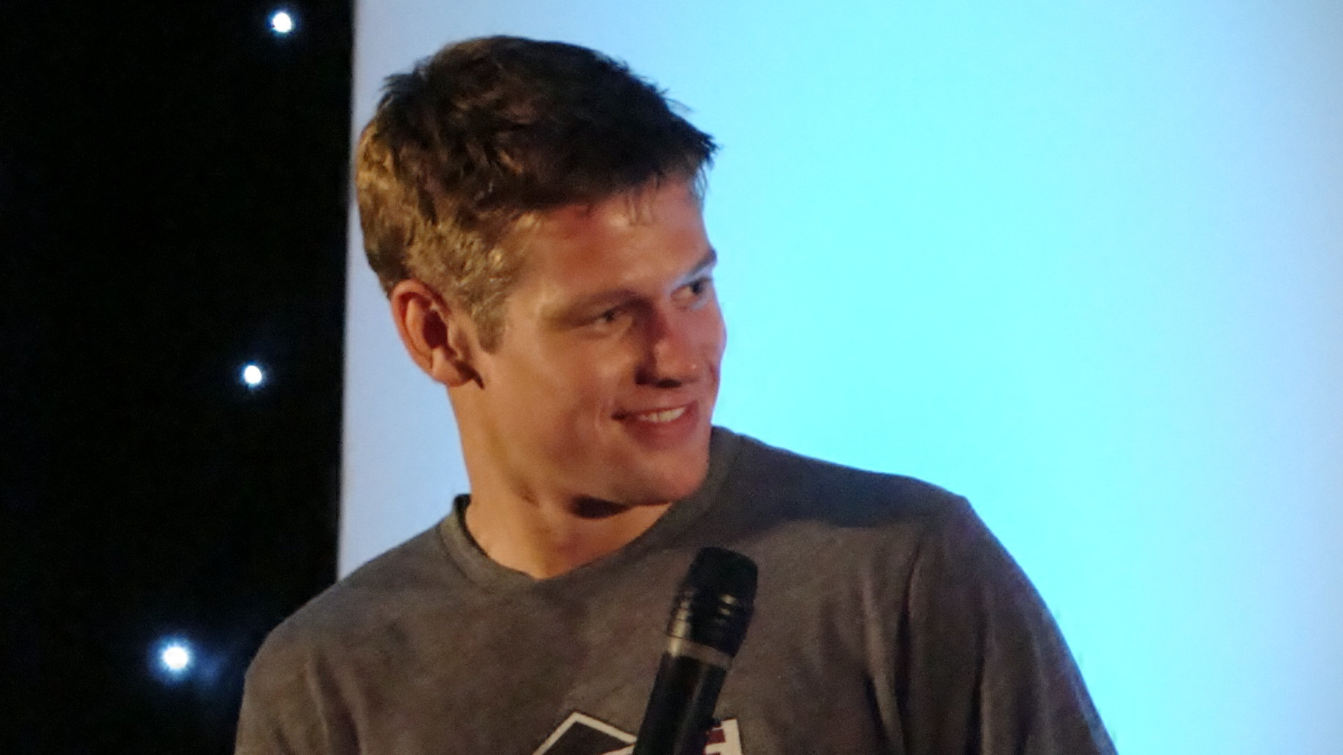 Zach Roerig